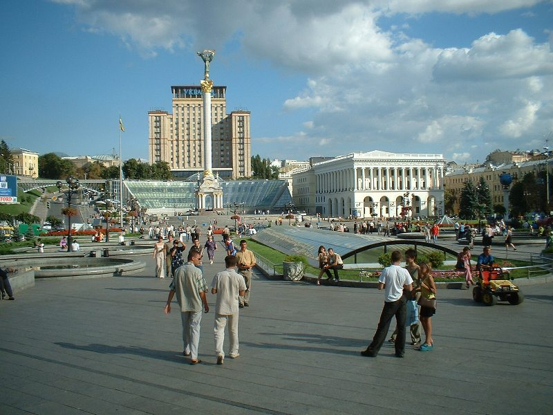 Ukrajina Kijev Trg Nezavisnosti